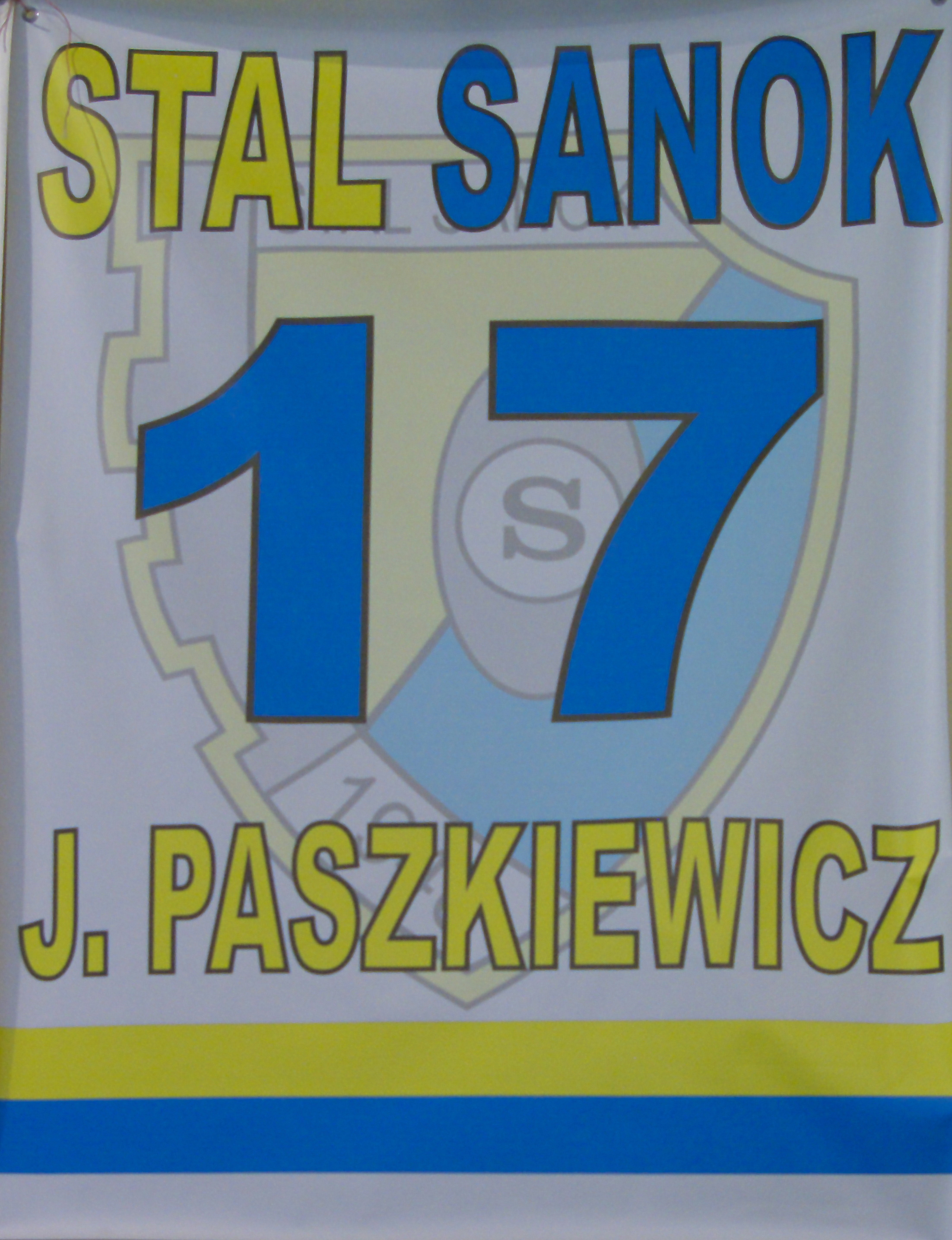 Numer 17 Jana Paszkiewicza upamiętniony w hali Arena Sanok